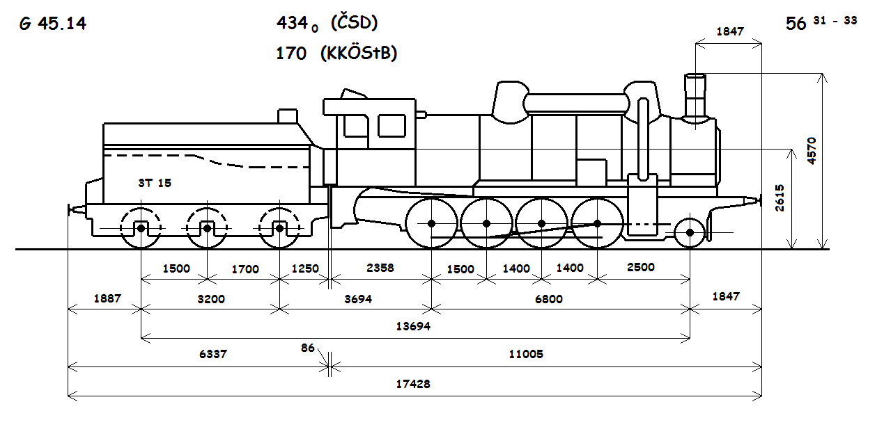 Schéma s rozměry lokomotivy řady 170 kkStB. Vytvořeno v programu malování dle výkresové dokumentace z publikace Železnice v Sudetech : 1938-1945, ISBN 80-903346-0-1. (Kniha je dostupná ve Studijní a vědecké knihovně v Hradci Králové.) Na požádání mohu poskytnou plnou verzi souboru ve formátu BMP 2.22 MB.